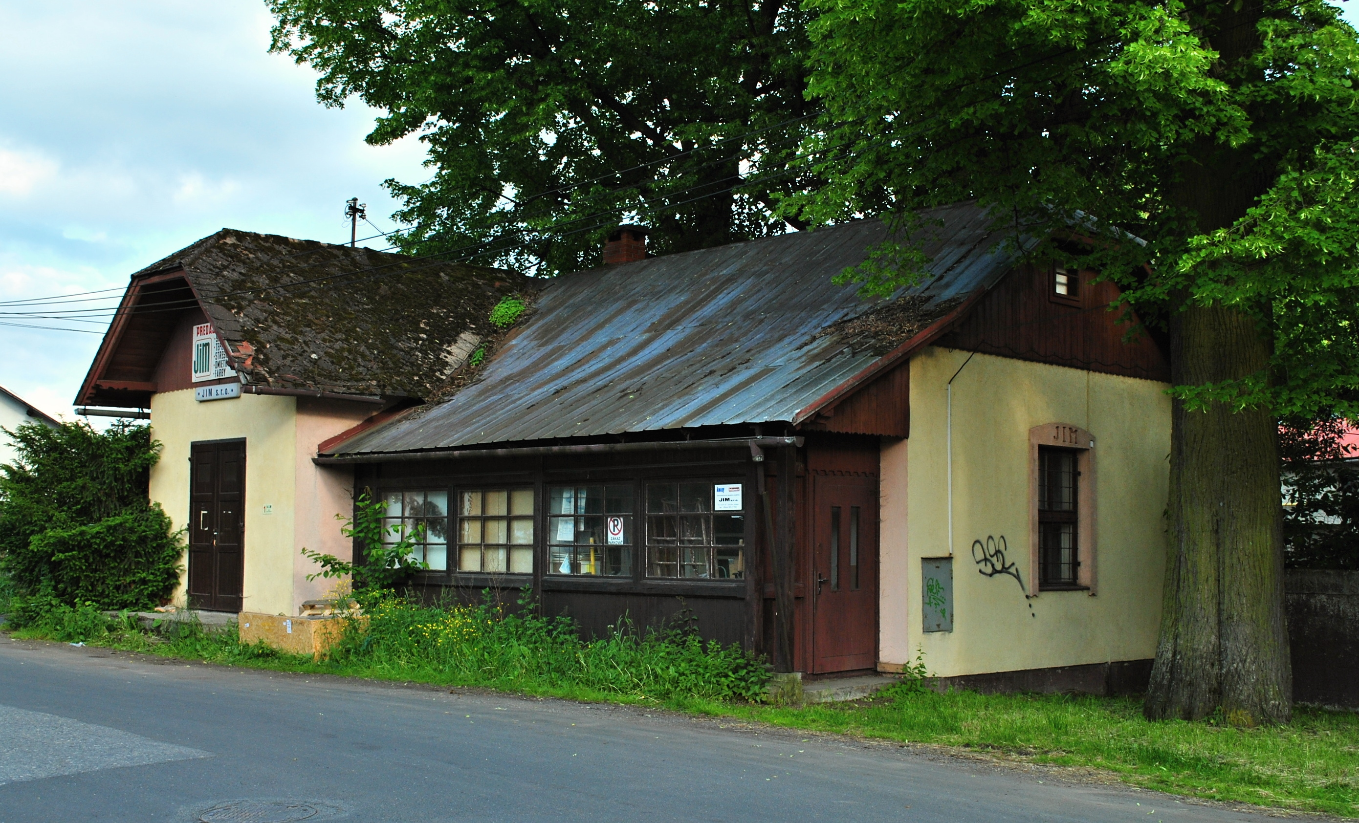 Stanica a koľajnice lesnej železnice